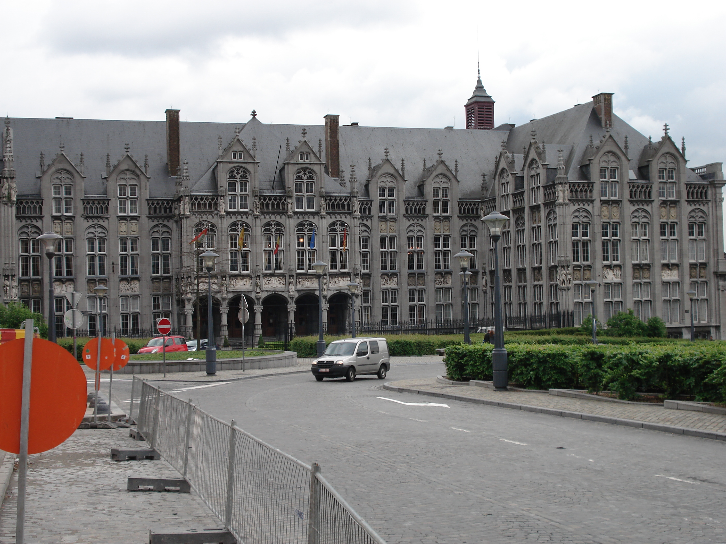 Zelf gemaakte foto, Provinciaal paleis te Luik.